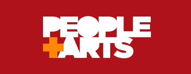 Tercer y ultimo logotipo del canal People+Arts, usado desde 2007 a 2010.